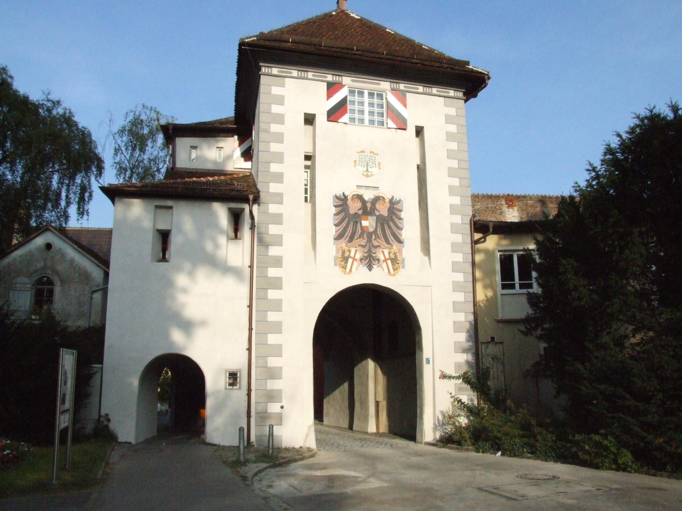 Lindauer Tor mit Kanonenkugel